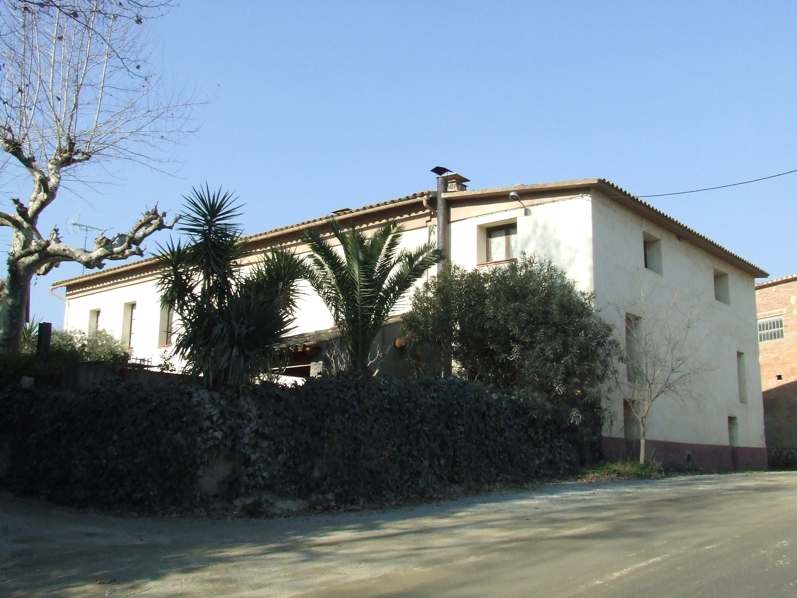 El Flix (Bigues, Bigues i Riells, Vallès Oriental)